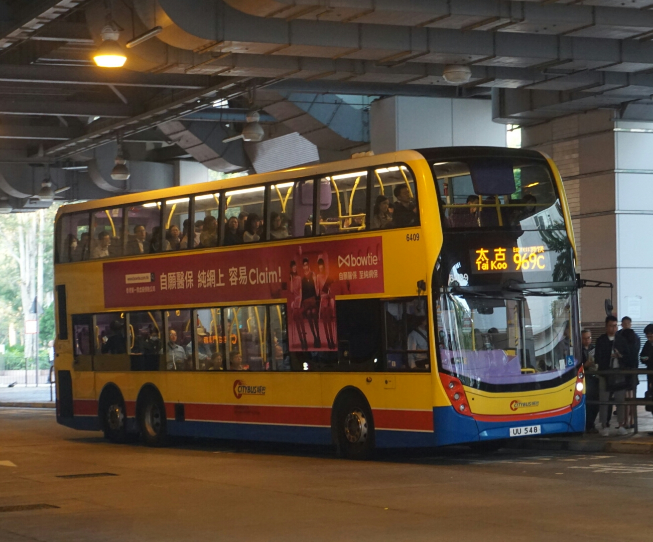 中文（香港）: 過海隧道巴士969C線，正在天水圍市中心上客